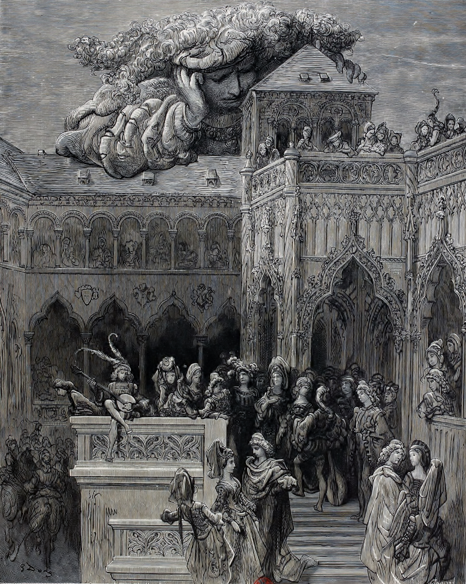 Planche pour le chapitre 57 " Comment estoient reiglez les Thelemites à leur manière de vivre" Œuvres de Rabelais, éditions Garnier Frères 1873.